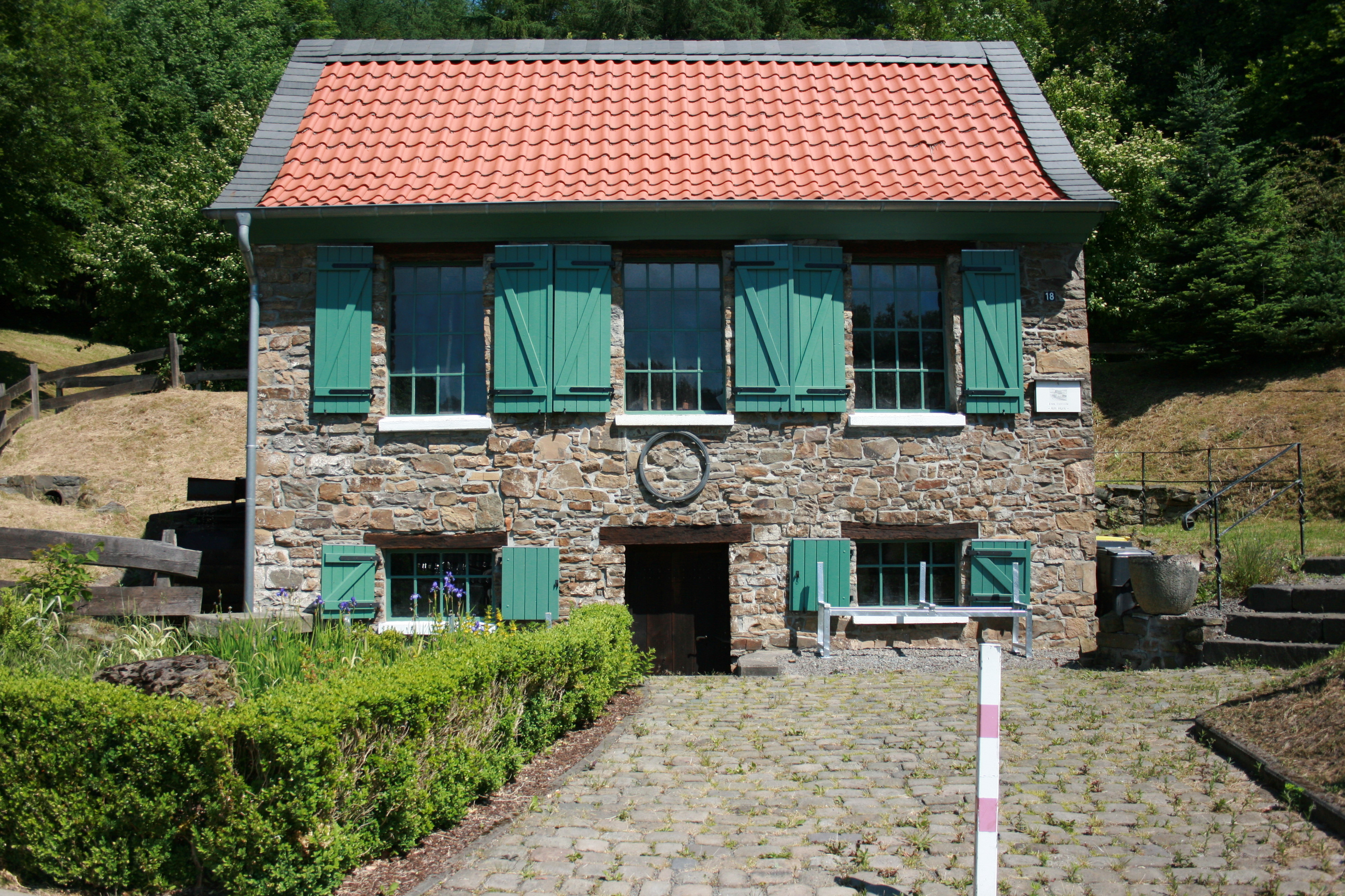 Drahtrolle am Hurk, Im Springen in Altena-Evingsen